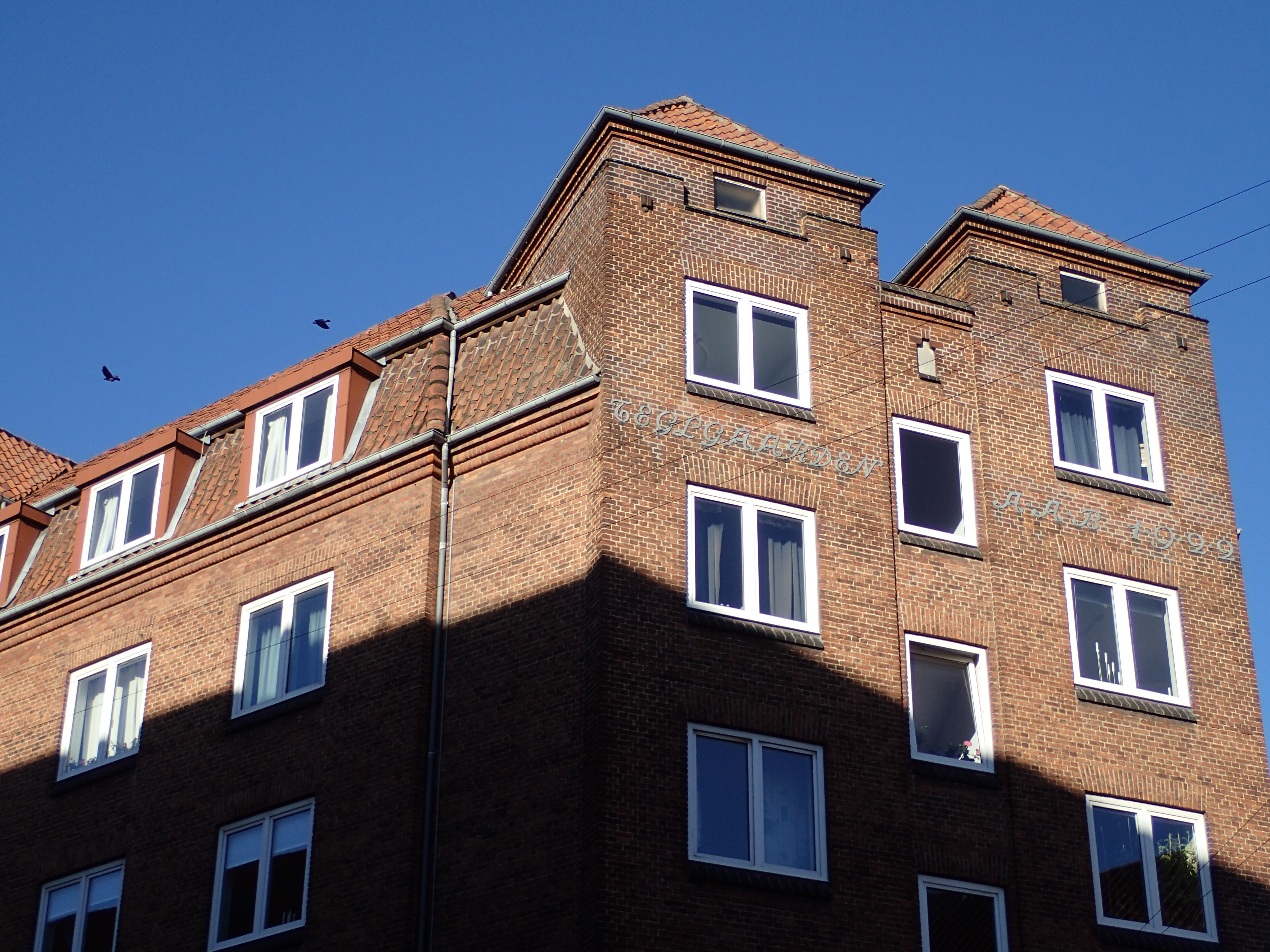 Teglgården i Aarhus. Teglgården er opkaldt efter et tidligere teglværk på grunden og er det første større lejlighedskompleks på Langelandsgade. Teglgården er opført i perioden 1921-28 og er ét af de første projekter i boligforeningen AAB.